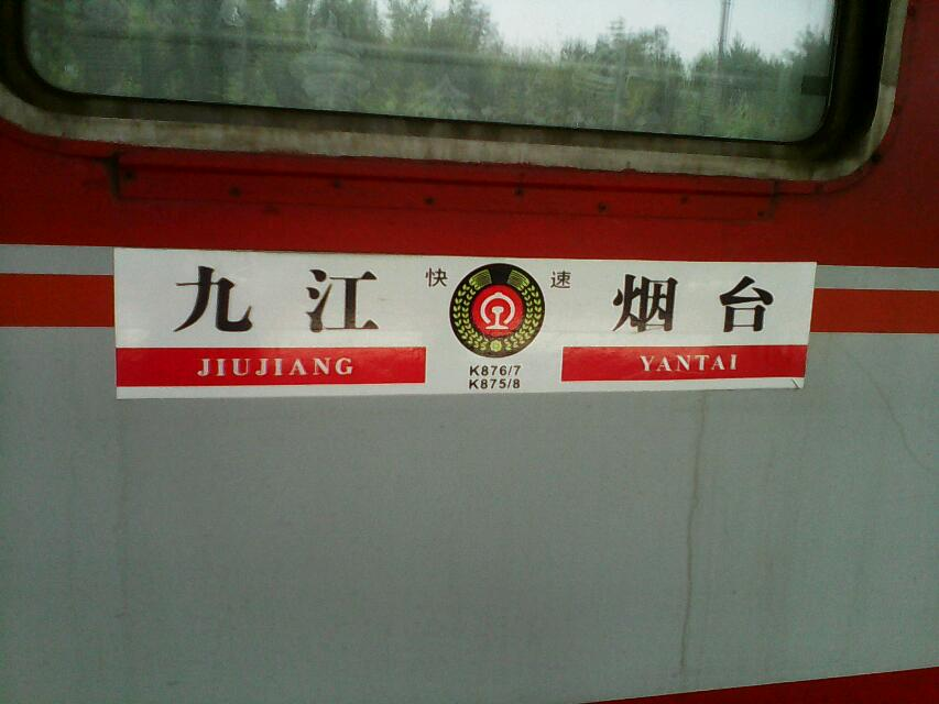 K876次水牌